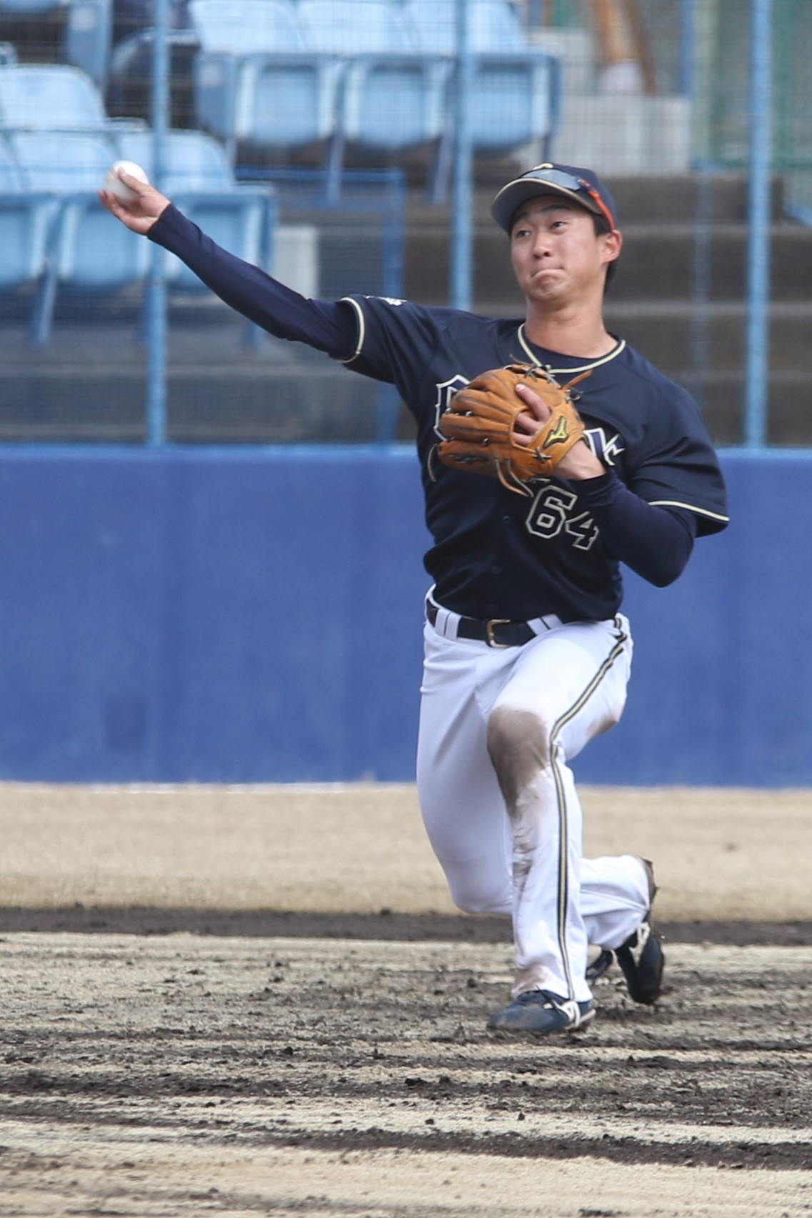 2019年3月17日、ナゴヤ球場にて